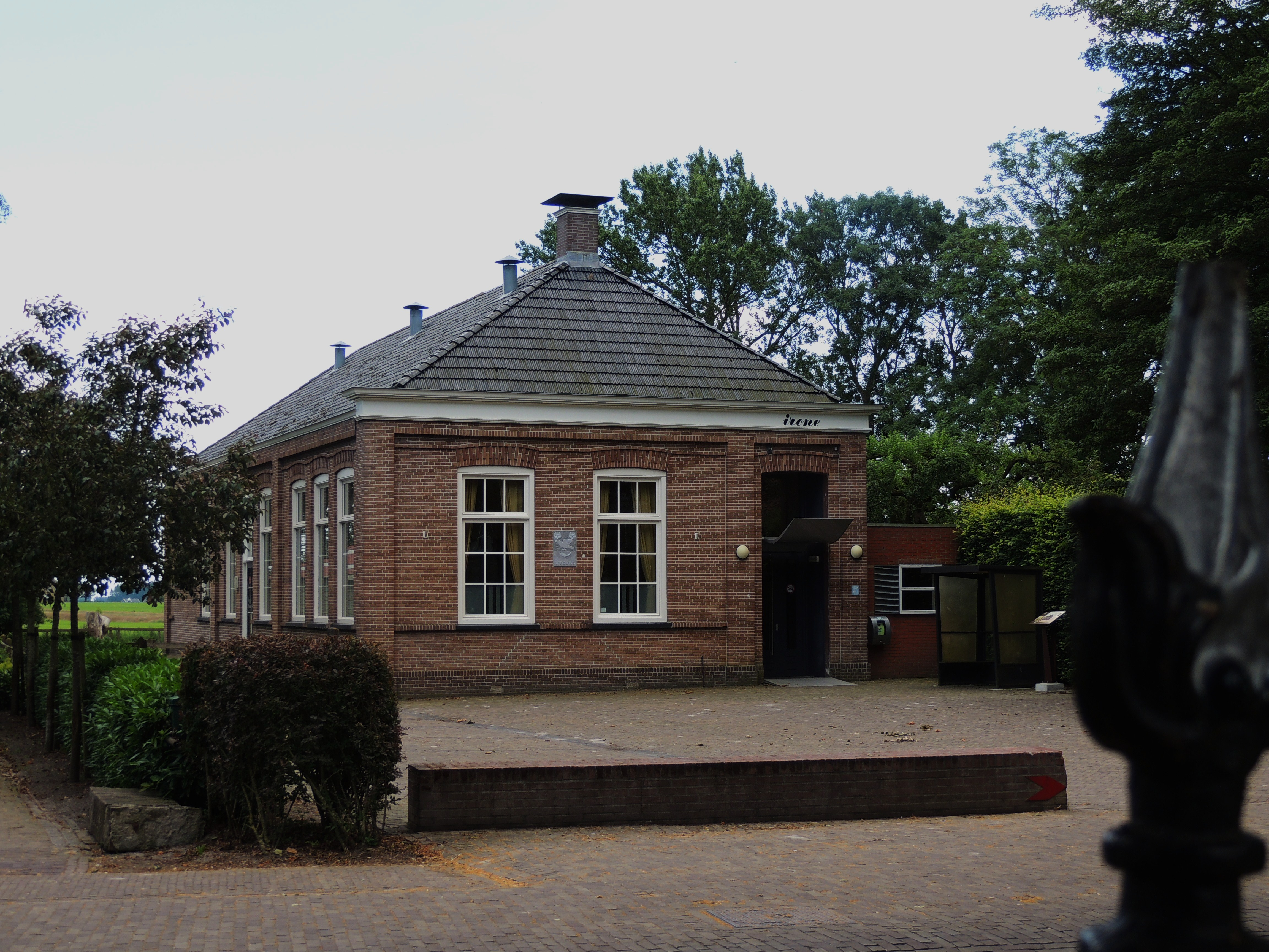 Irene school nu Dorpshuis Wijckel